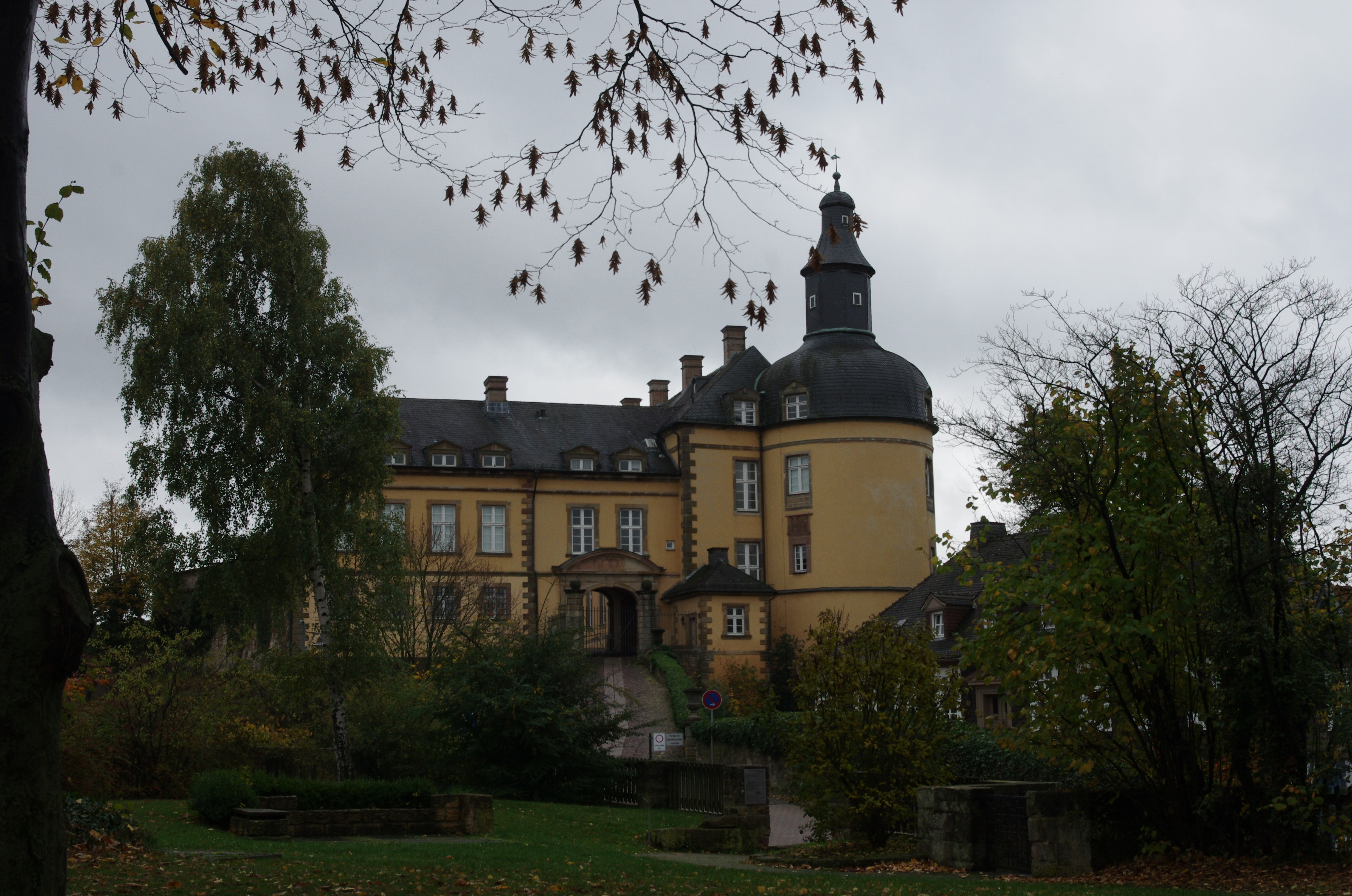 Bad Wildungen Ortsteil Altwildungen in Hessen. Blick auf das Schloß von der Kirche aus.